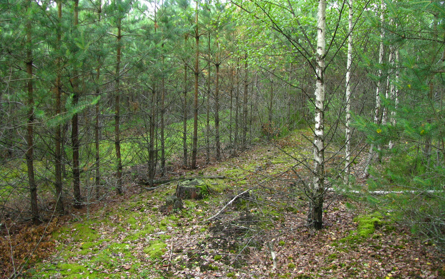 Молодой лес